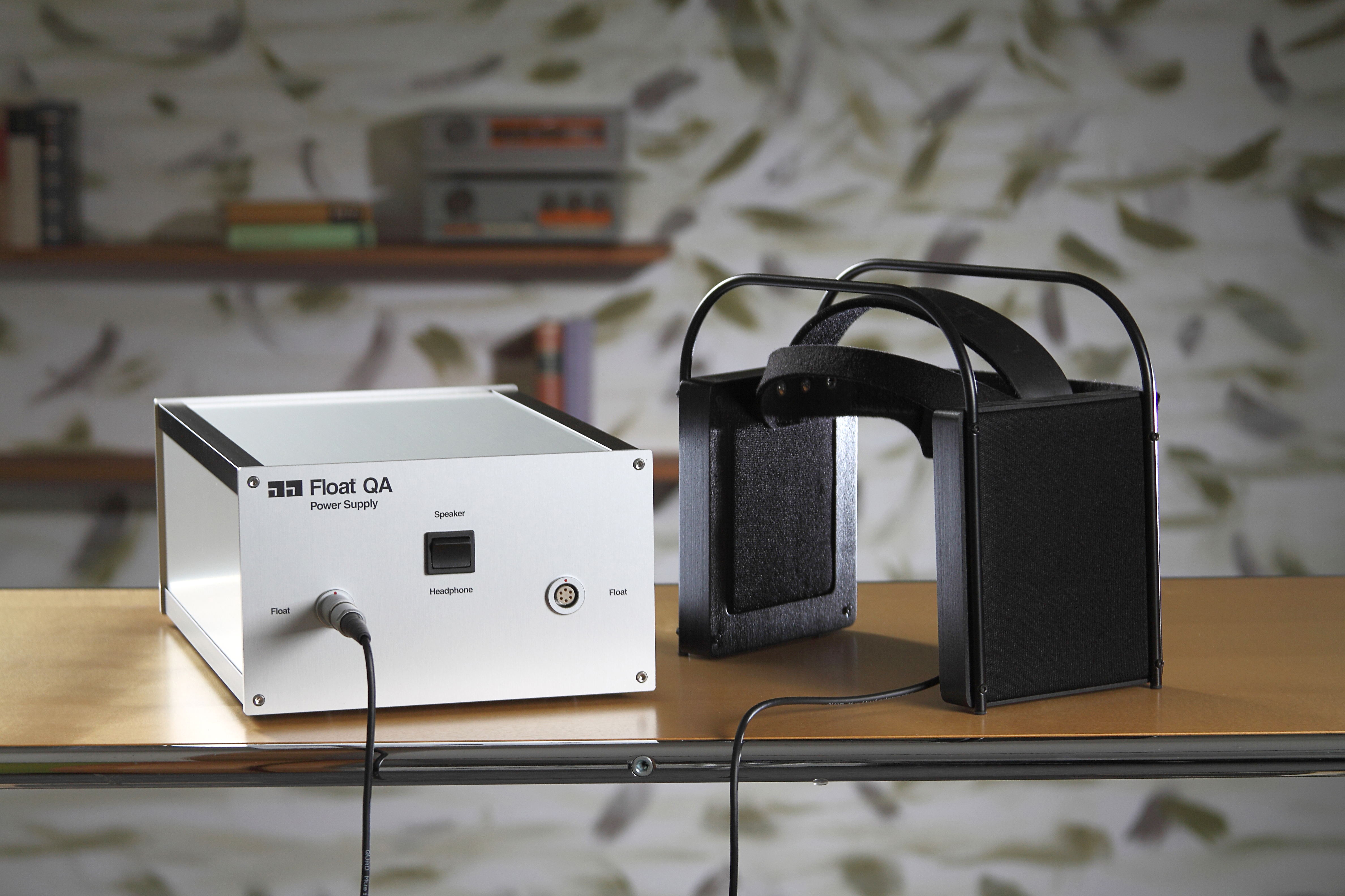 QUAD Float QA elektrostatischer Kopfhörer mit Speiseteil. Nachfolgemodell des früheren Jecklin Float. Gemeinsame Entwicklung der Fa. QUAD Musikwiedergabe und Jürg Jecklin